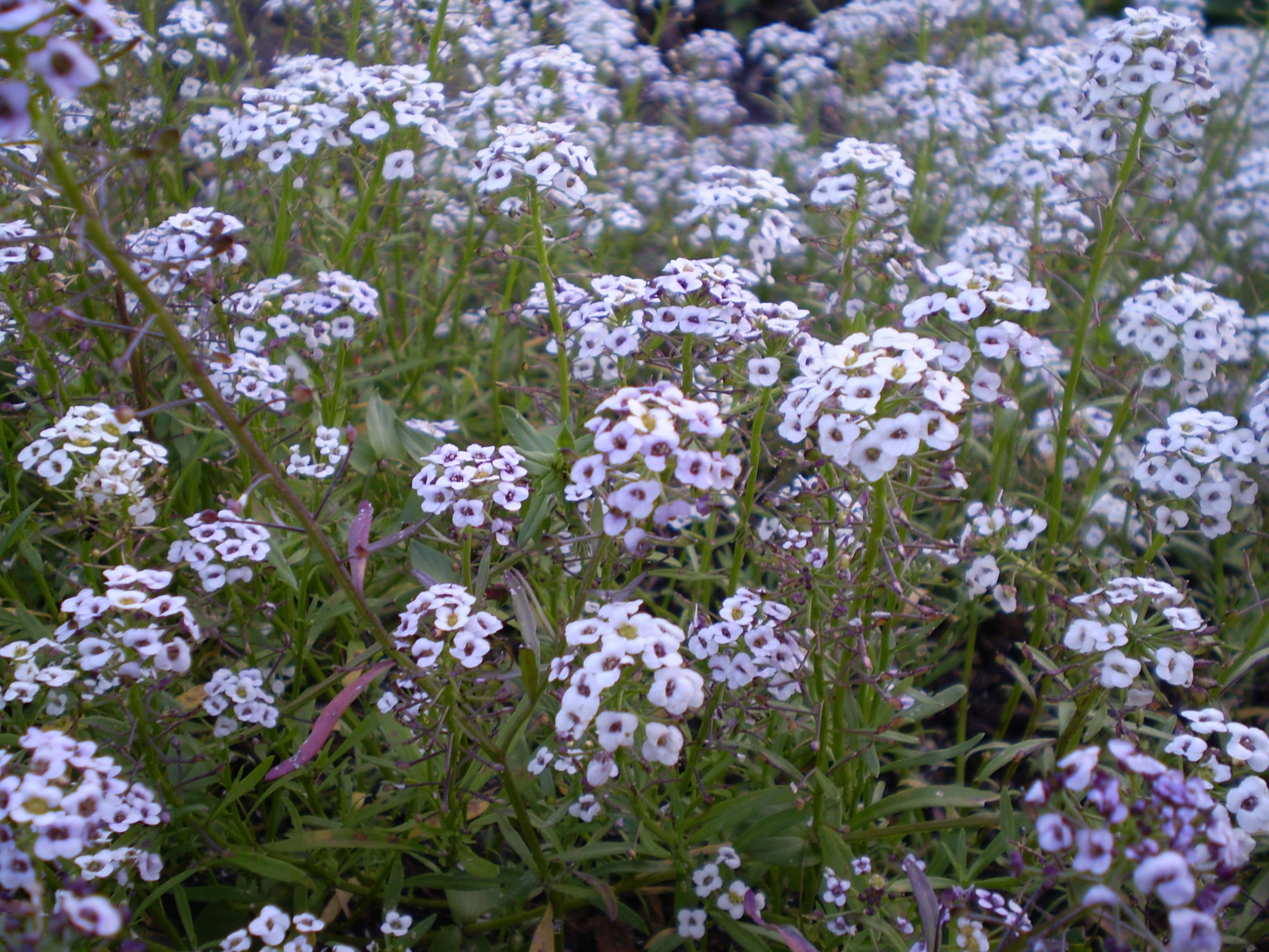 Lobularia maritimasneeuwkleed